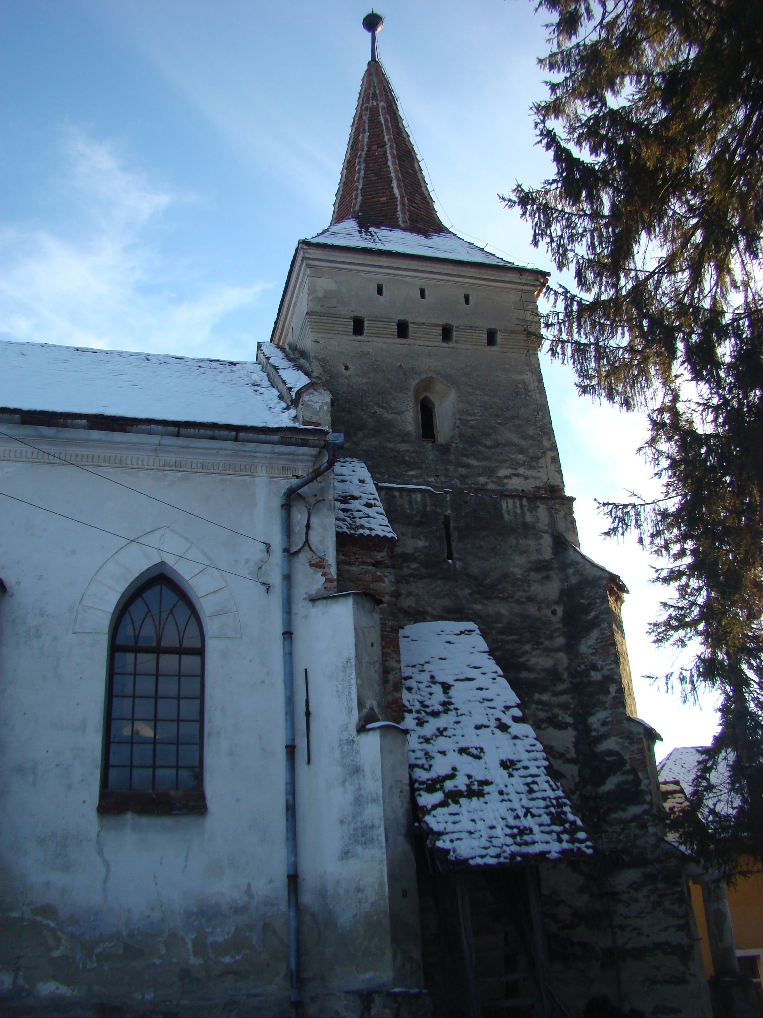 Biserica evanghelică fortificată din Metiș, județul Sibiu